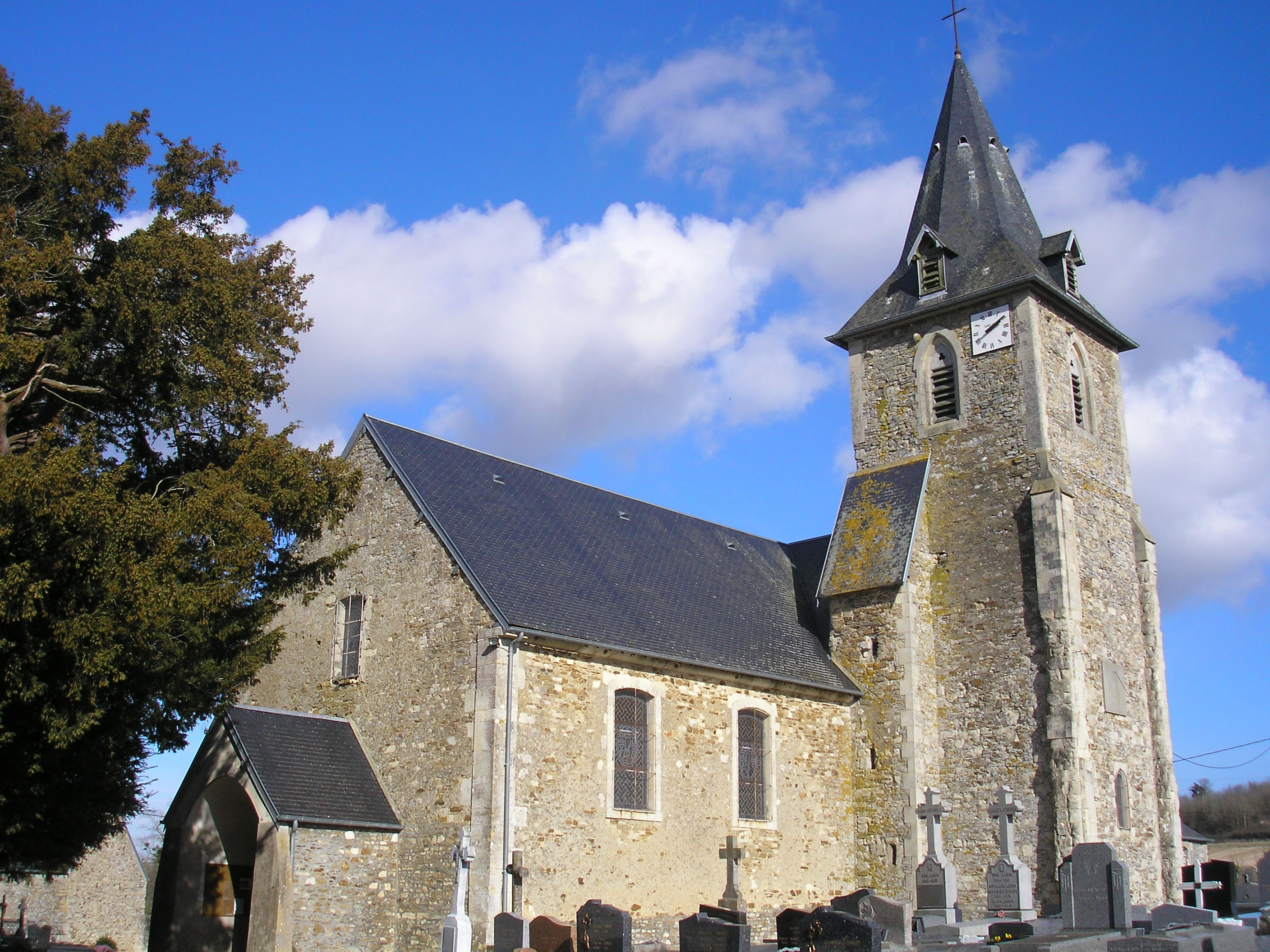 Villy-Bocage (Normandie, France). L'église Saint-Hilaire.